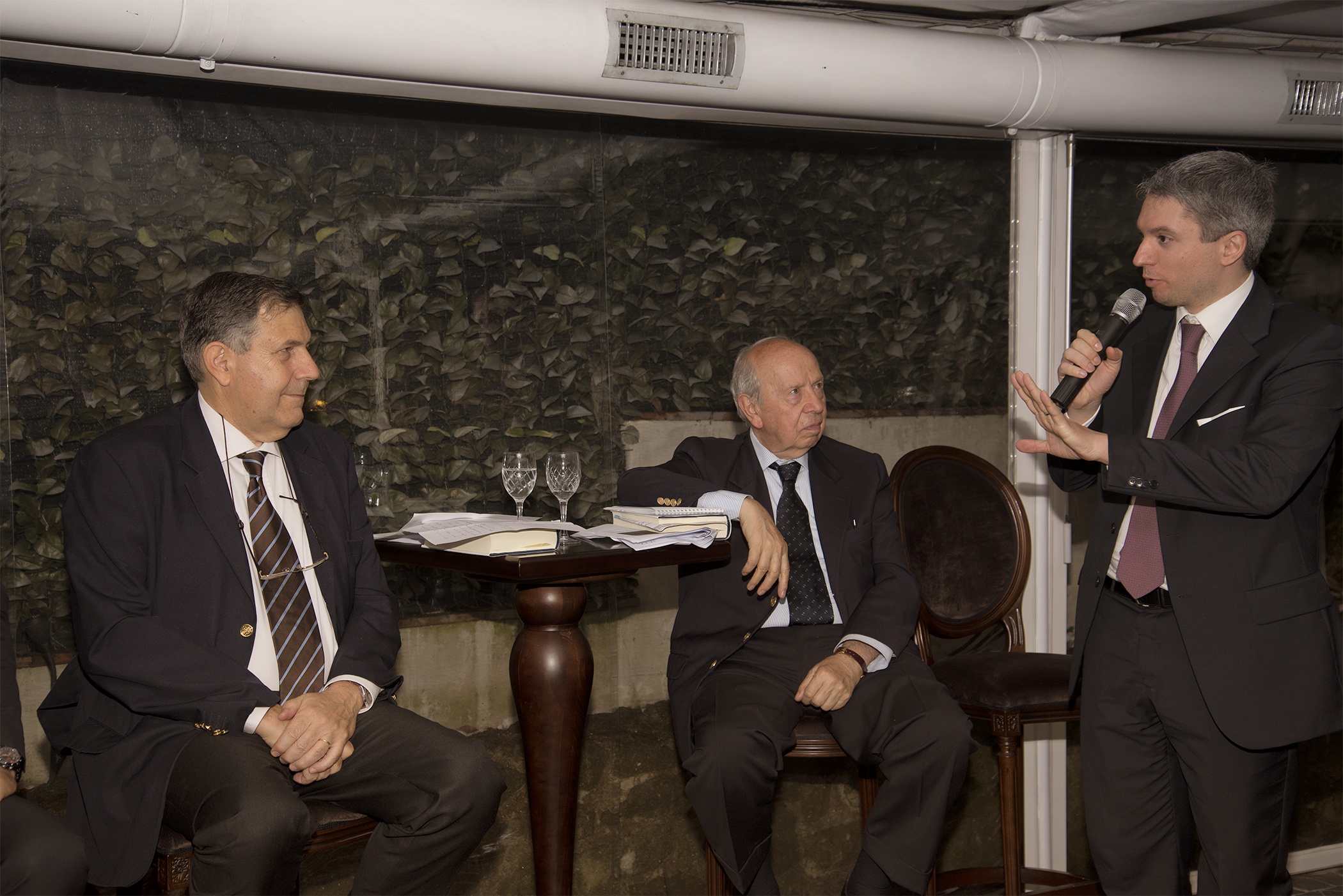 Pierluigi Testa con il Presidente Lamberto Dini e l'on. Giampaolo Galli